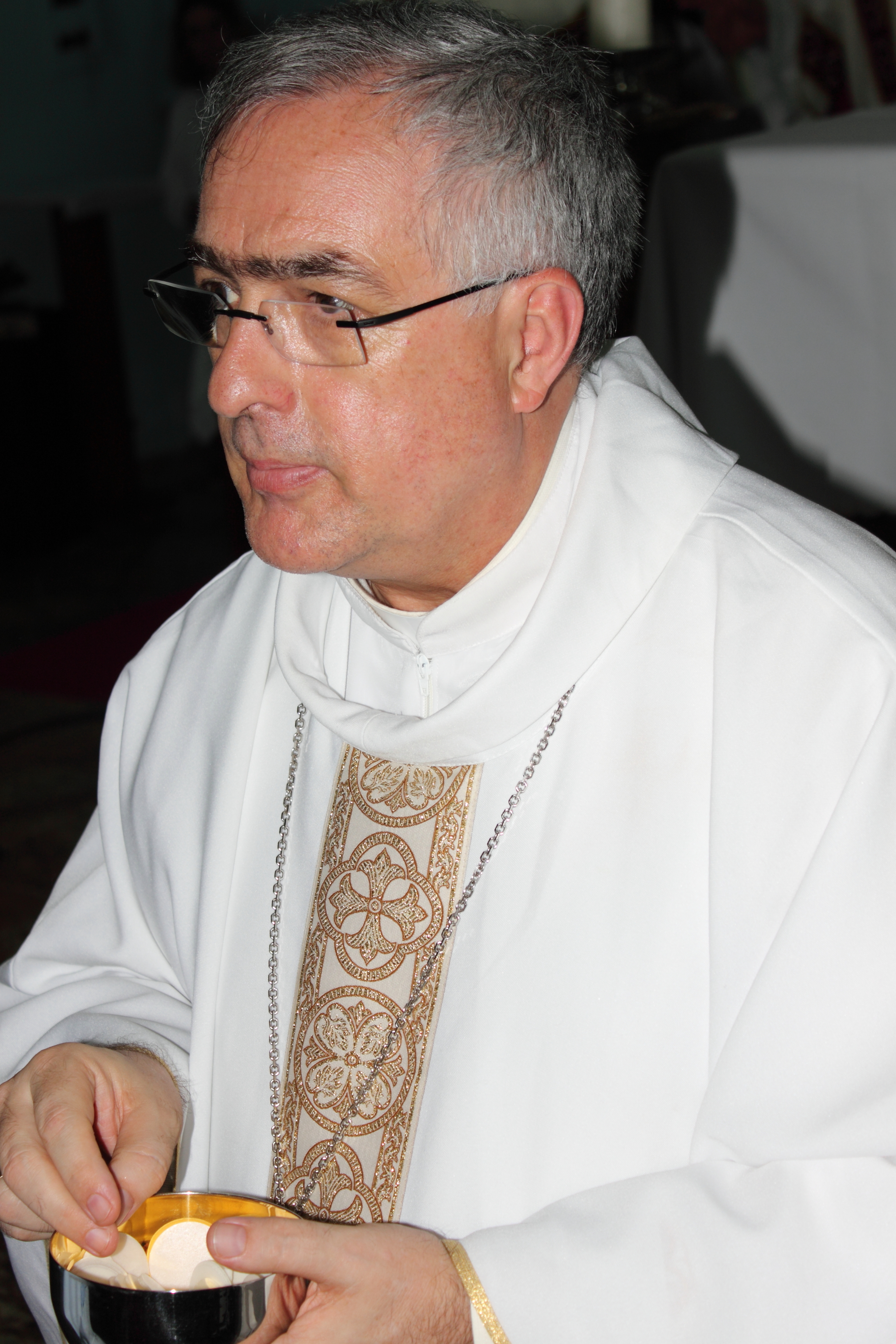 Dom Roberto Lopes OSB, Abade do Mosteiro de São Bento (Rio de Janeiro)